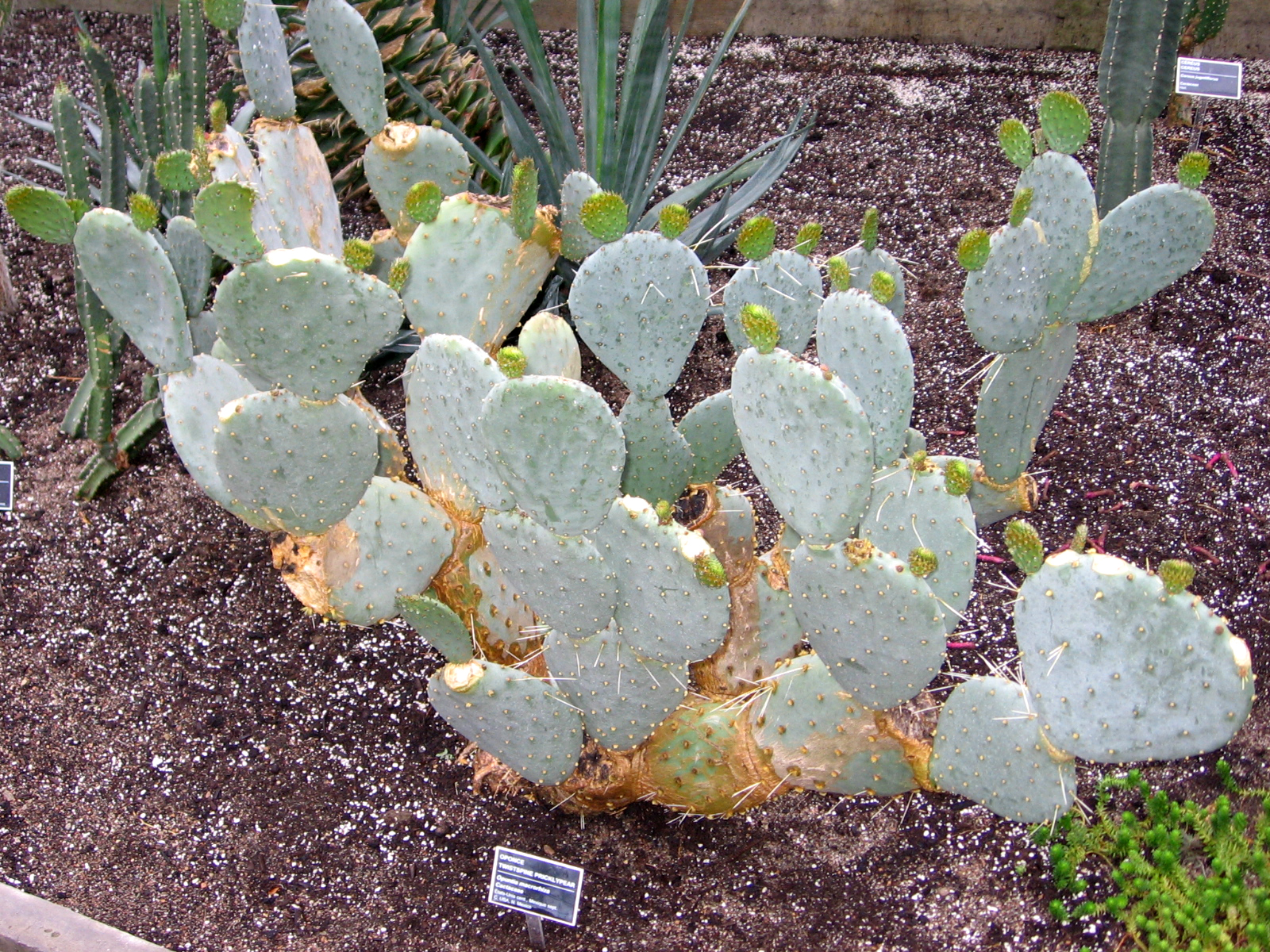 Opuntia macrorhiza, Jardin Botanique de Montréal